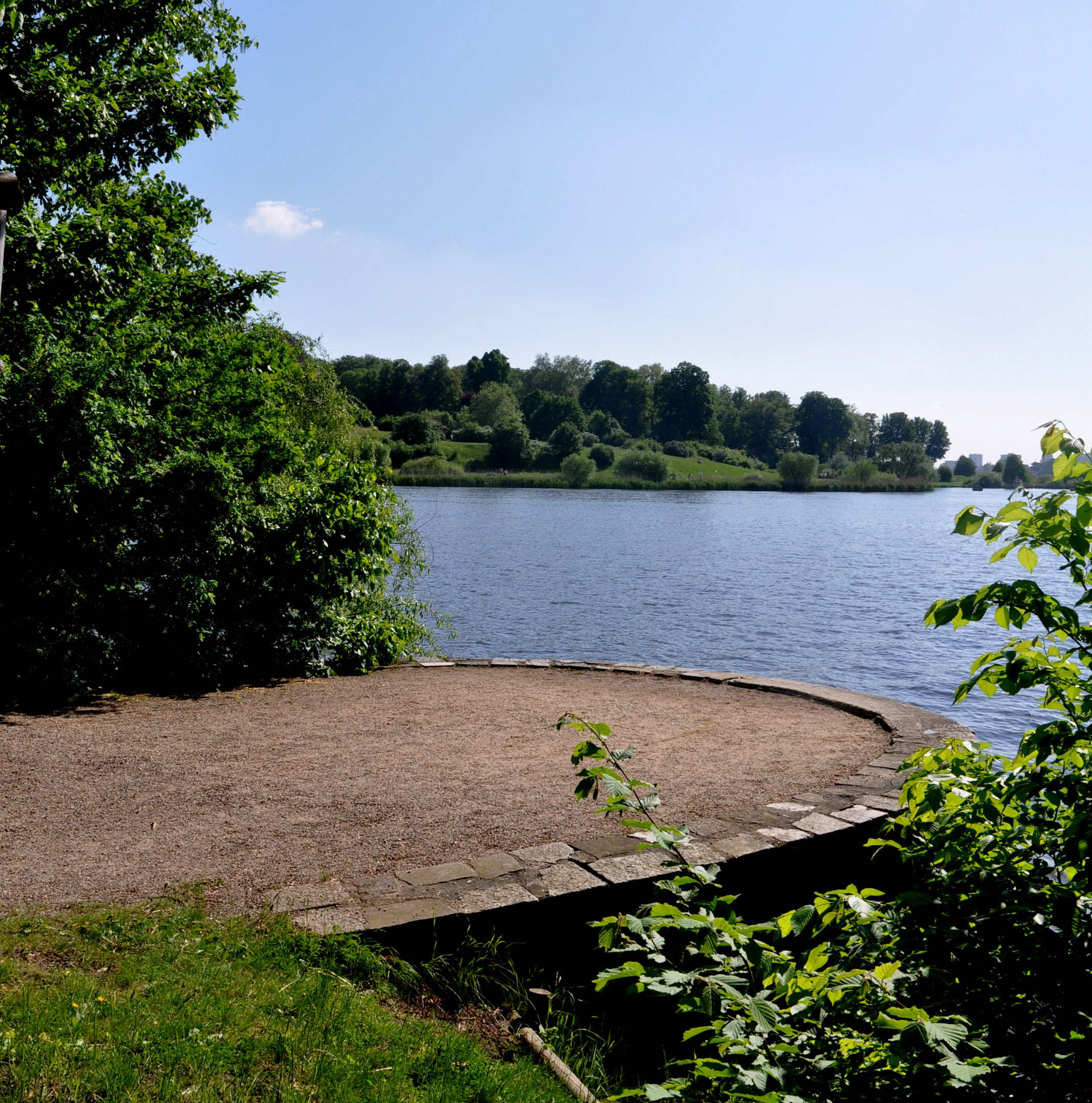 Blick von der Aussichtsbastion nach Babelsberg